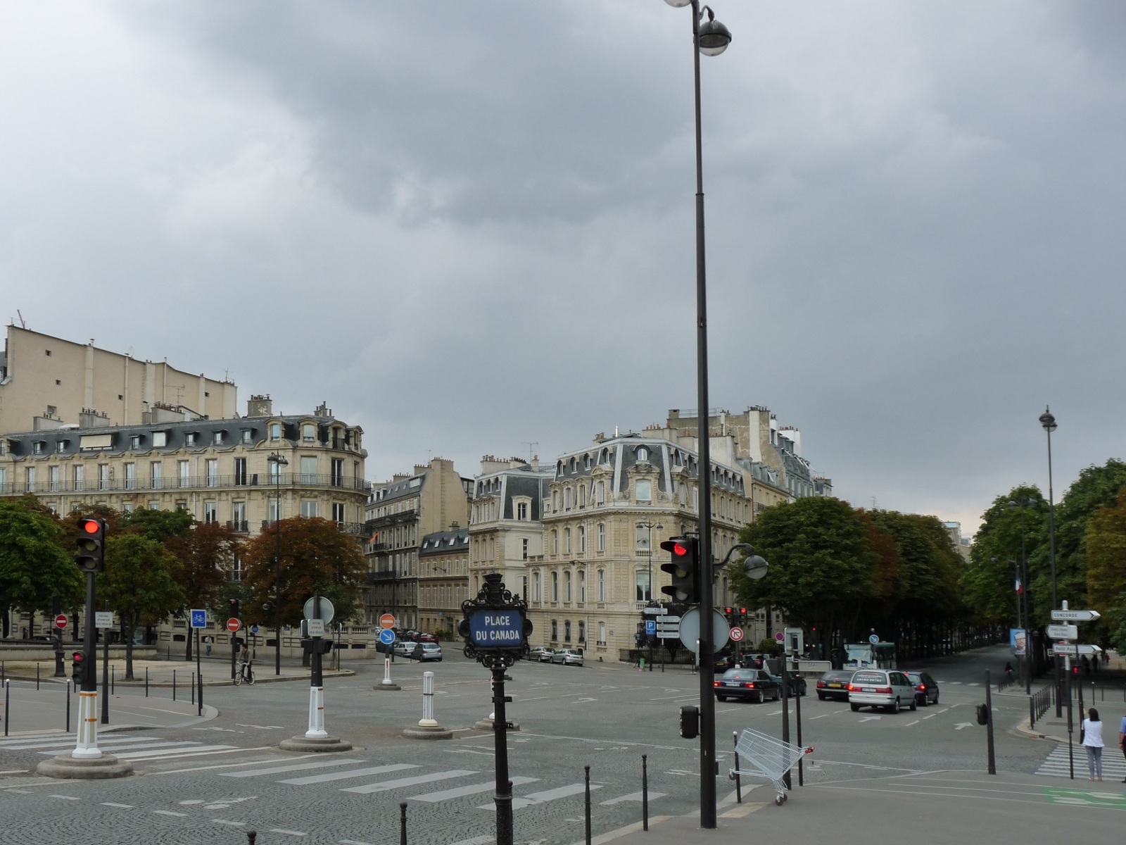 La palce du Canada à Paris, vu de l'angle du cours de la reine avec le pont des Invalides